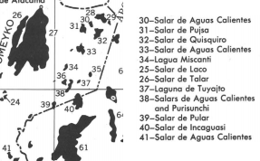 Cuatro salares "Aguas Calientes"